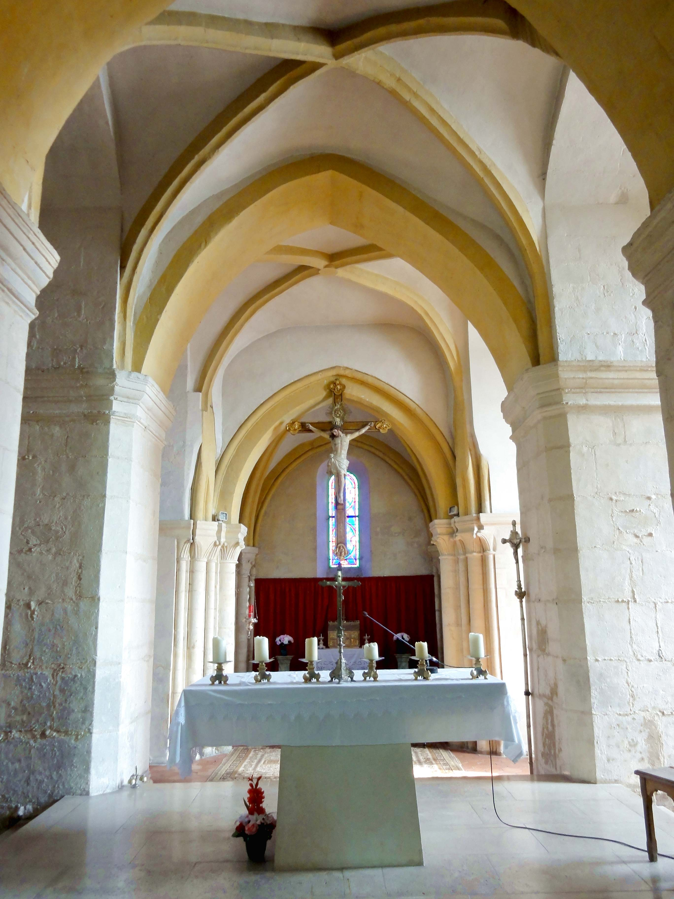 Intérieur de l'église - voir titre.